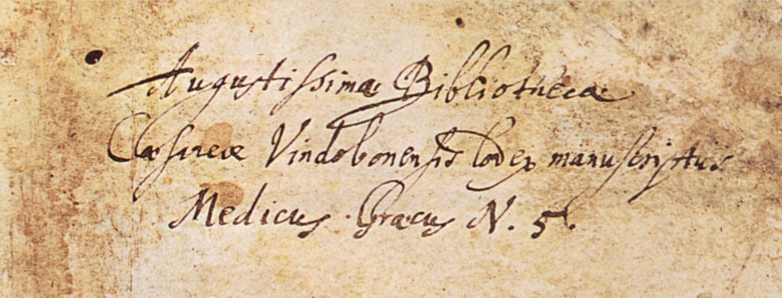 Besitzvermerk und Signatur der Wiener Hofbibliothek: Augustissimae Bibliothecae / Caesareae Vindobonensis Codex manuscriptus / Medicus graecus N. 5 (Wiener Dioskurides fol. 2 recto)